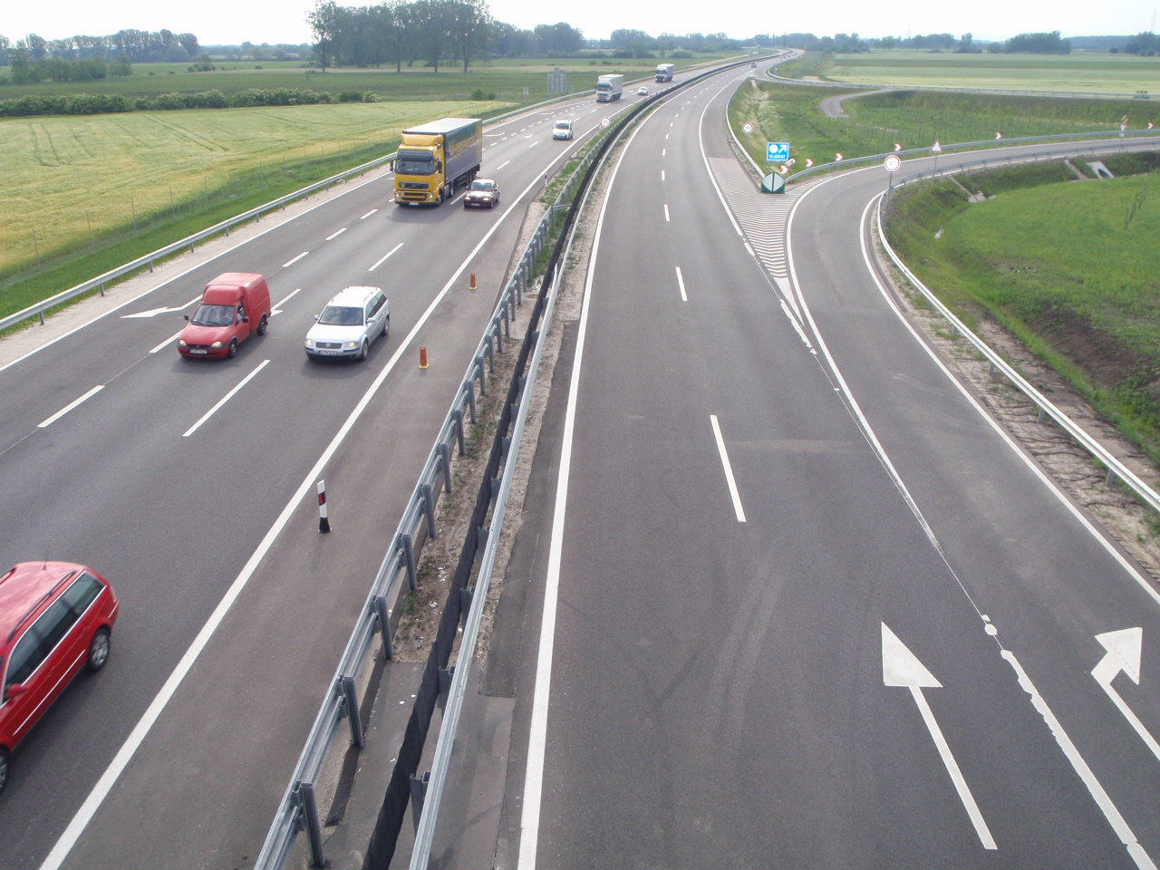 M85 Enese mellett Győr felé tekintve